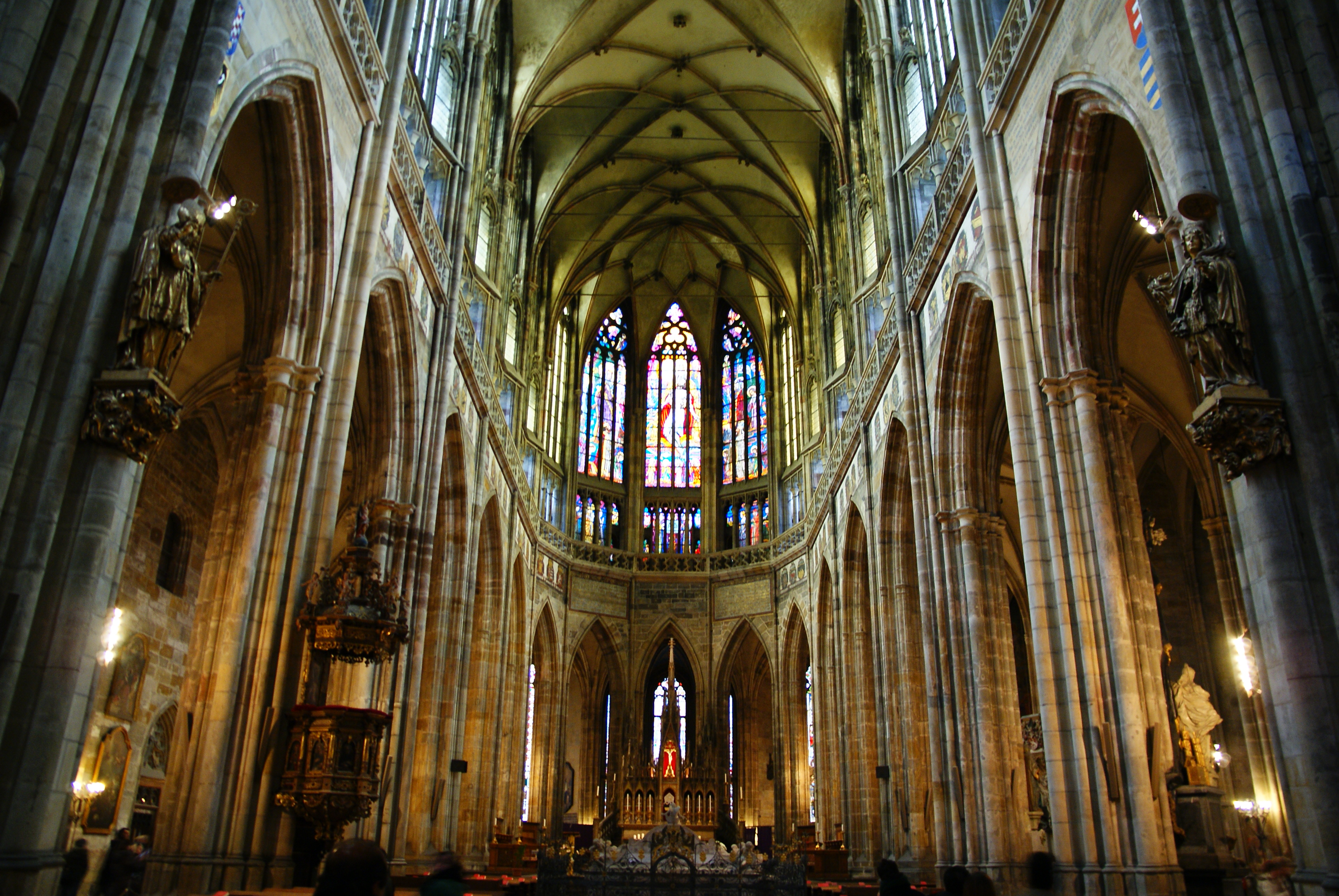 Pražský hrad, Praha 1, č.p. 1